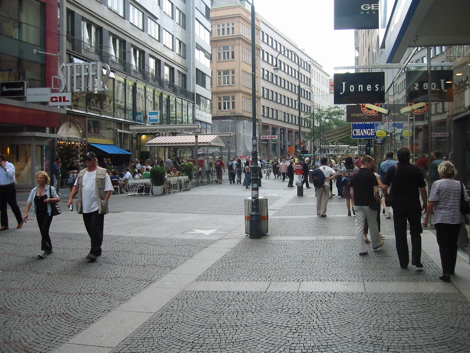 Kärntner Straße